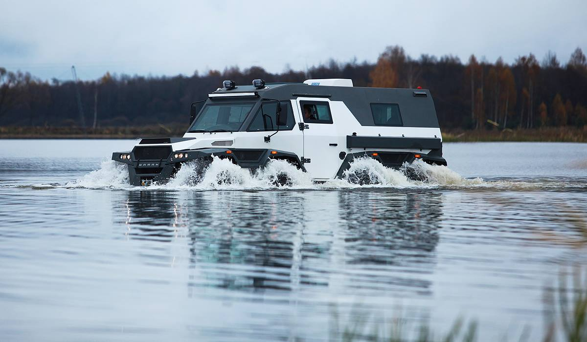 Шаман — вездеход-амфибия на шинах сверхнизкого давления, производится компанией "Авторос".